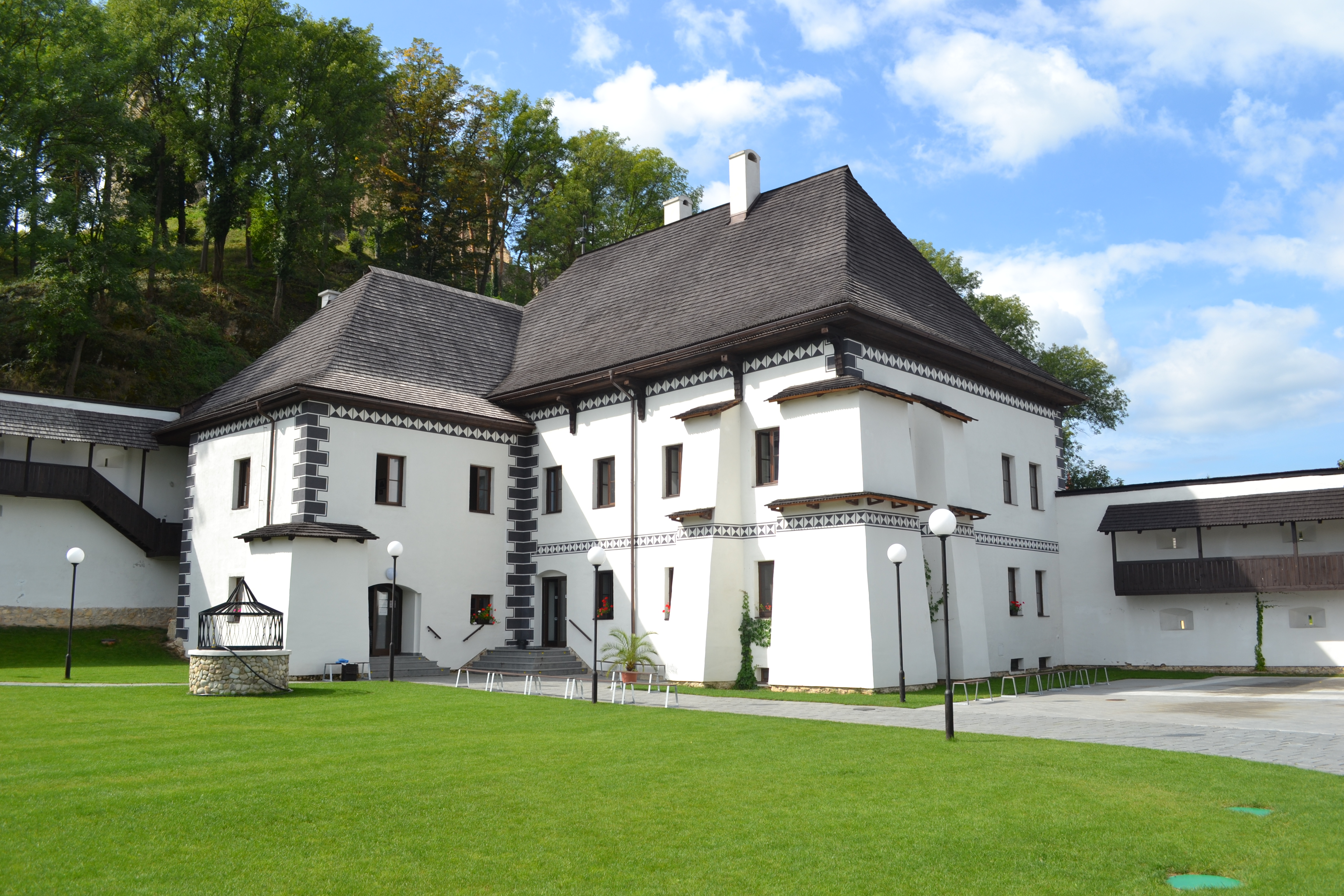 Renesančný kaštieľ v Divíne z prelomu rokov 1670 – 1671